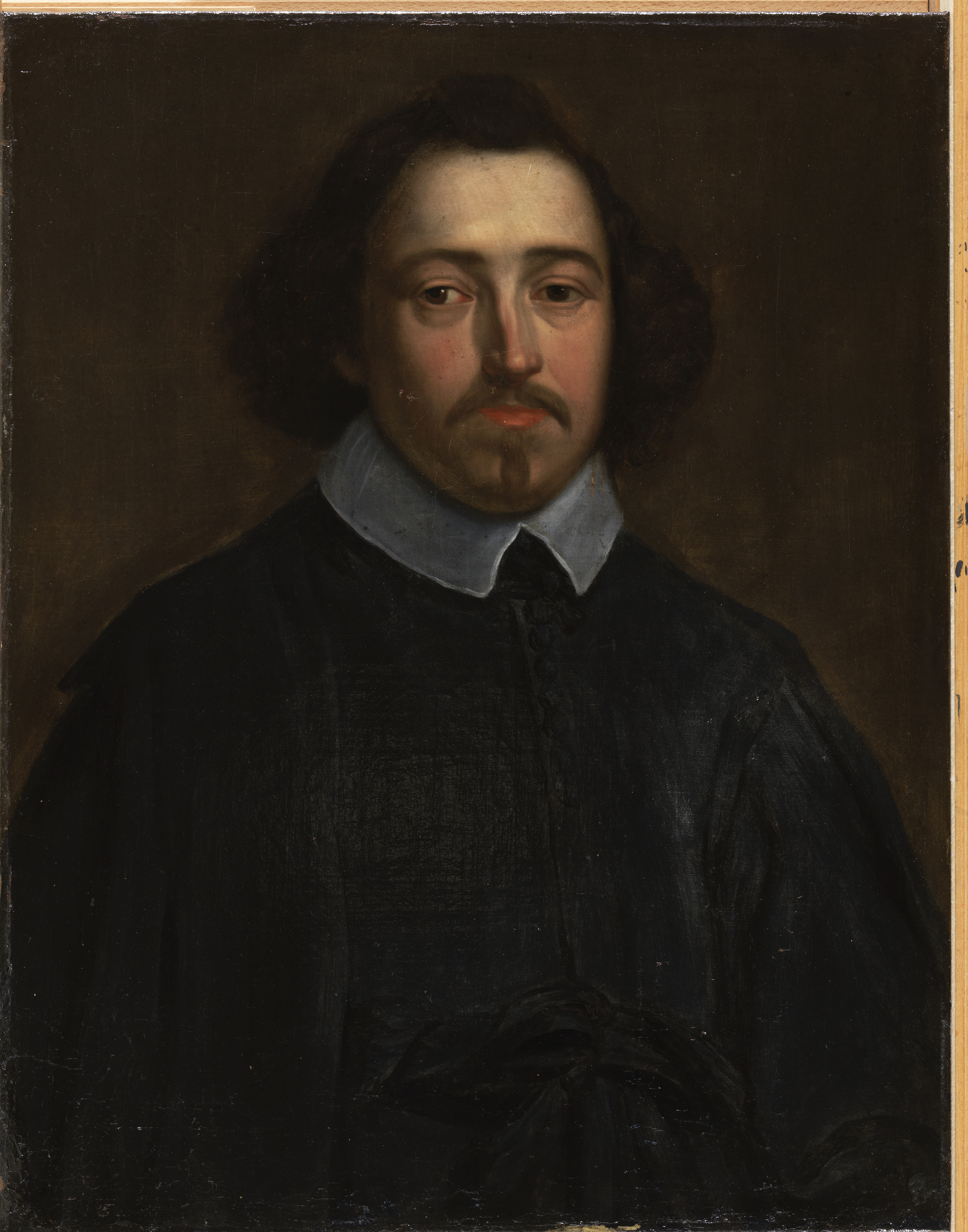 schilderij ( Balthasar van Meurs, Museum Plantin-Moretus